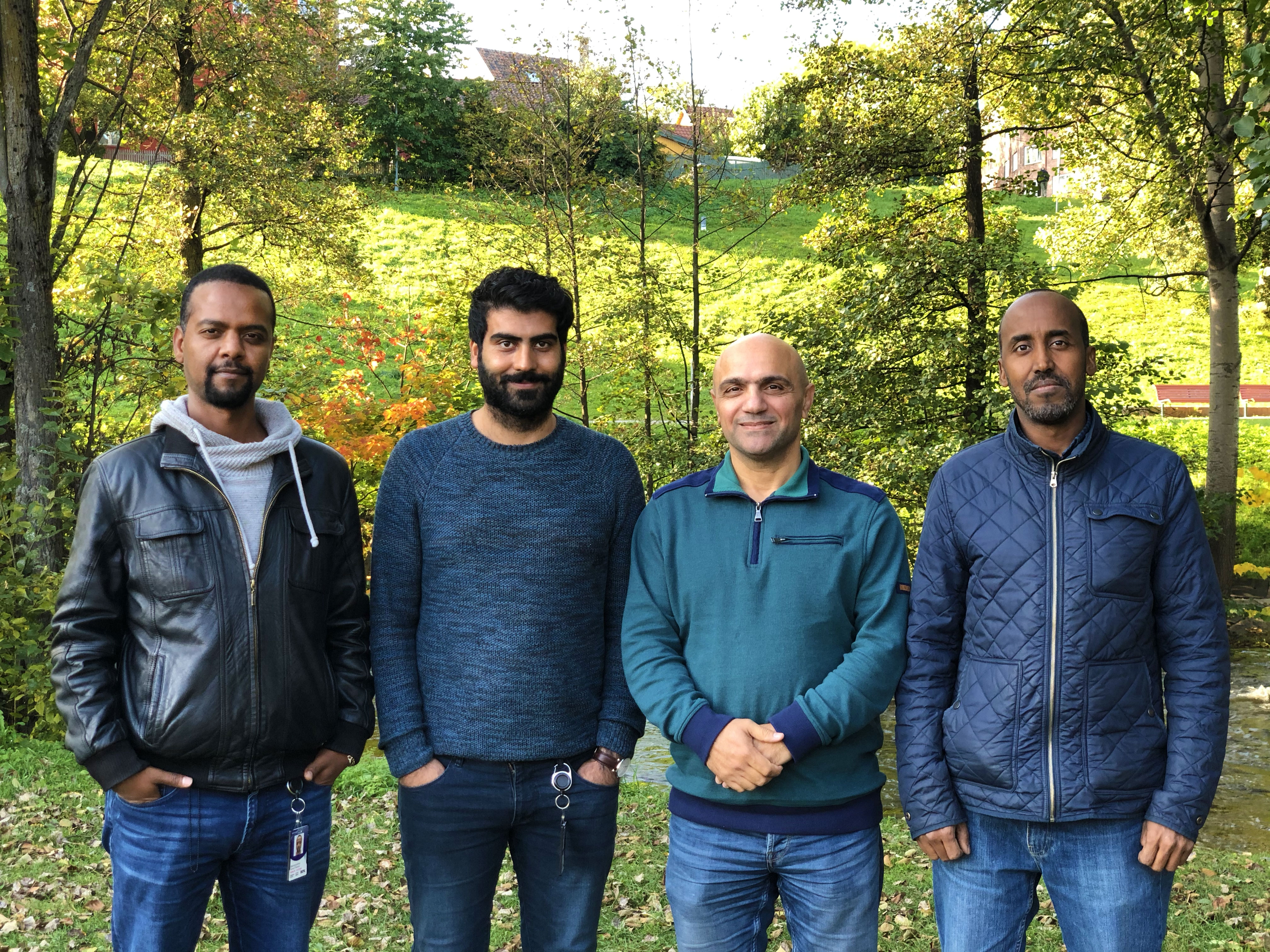 Oversettere og innlesere i NRK Ny i Norge